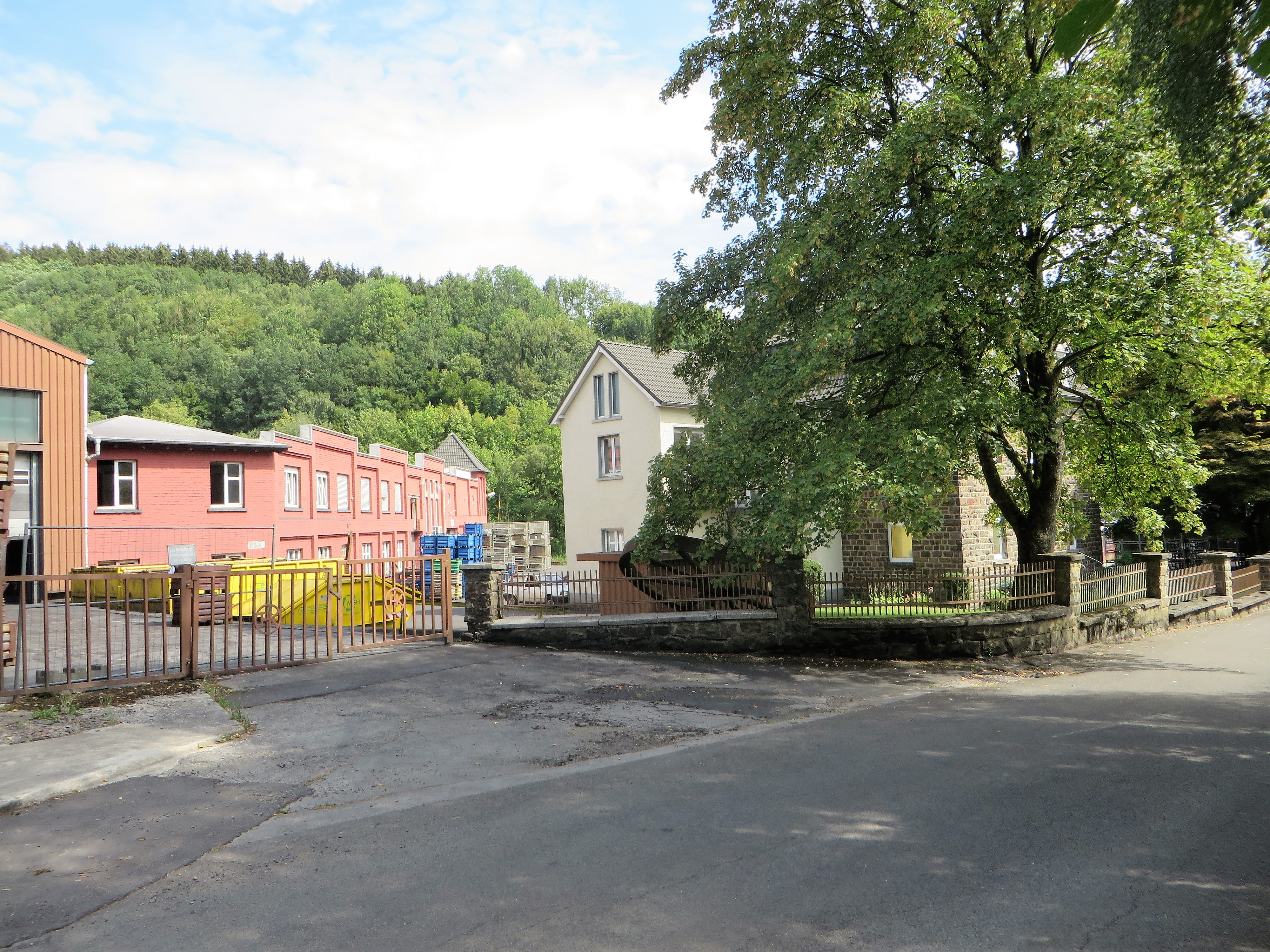 Firma Kröger Stahlumformung GmbH (Gesenkschmiede, gegr. 1884) im Attendorner Ortsteil Merklinghausen.